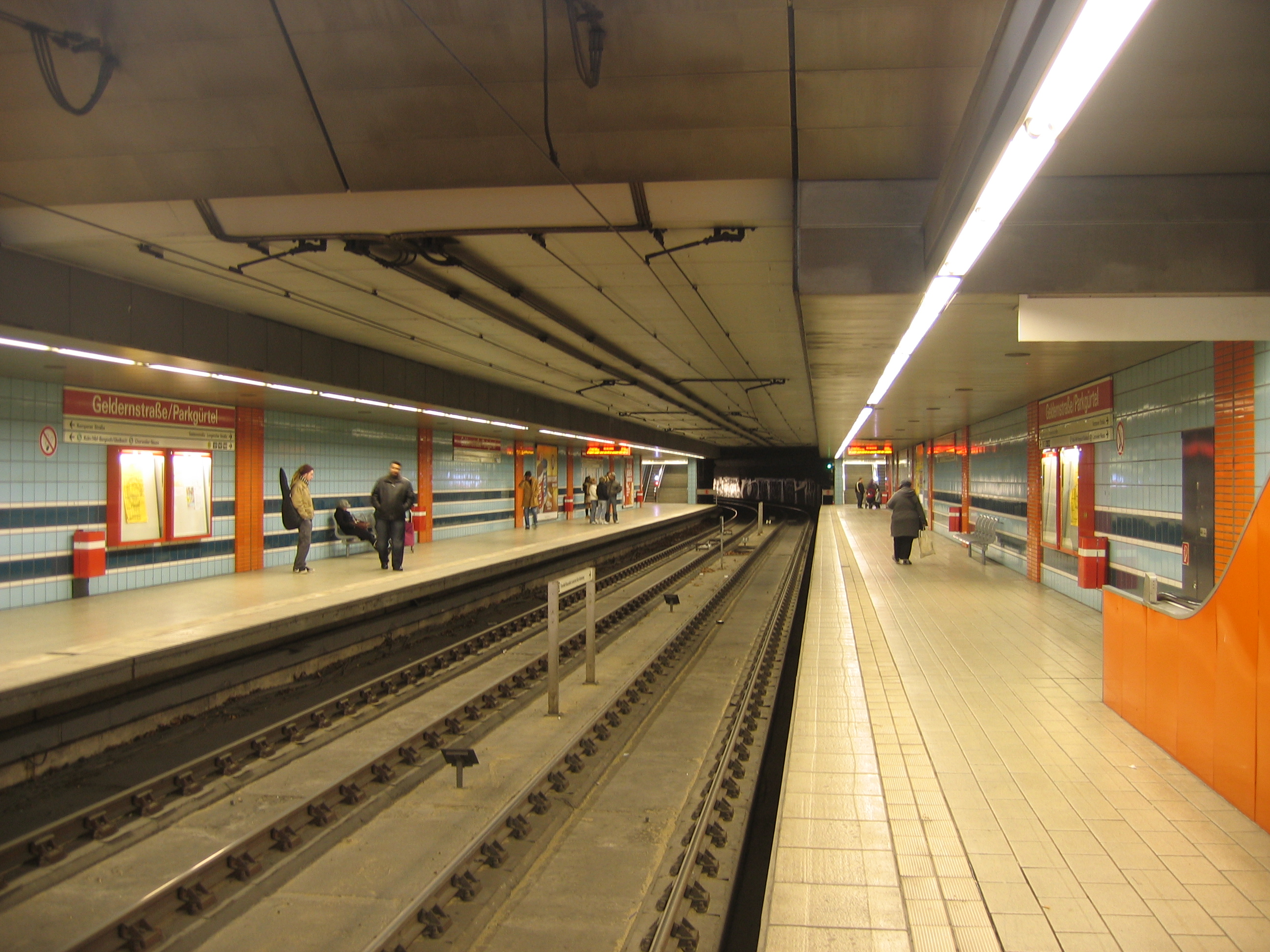 U-Bahn-Station Geldernstr./Parkgürtel der Stadtbahn Köln